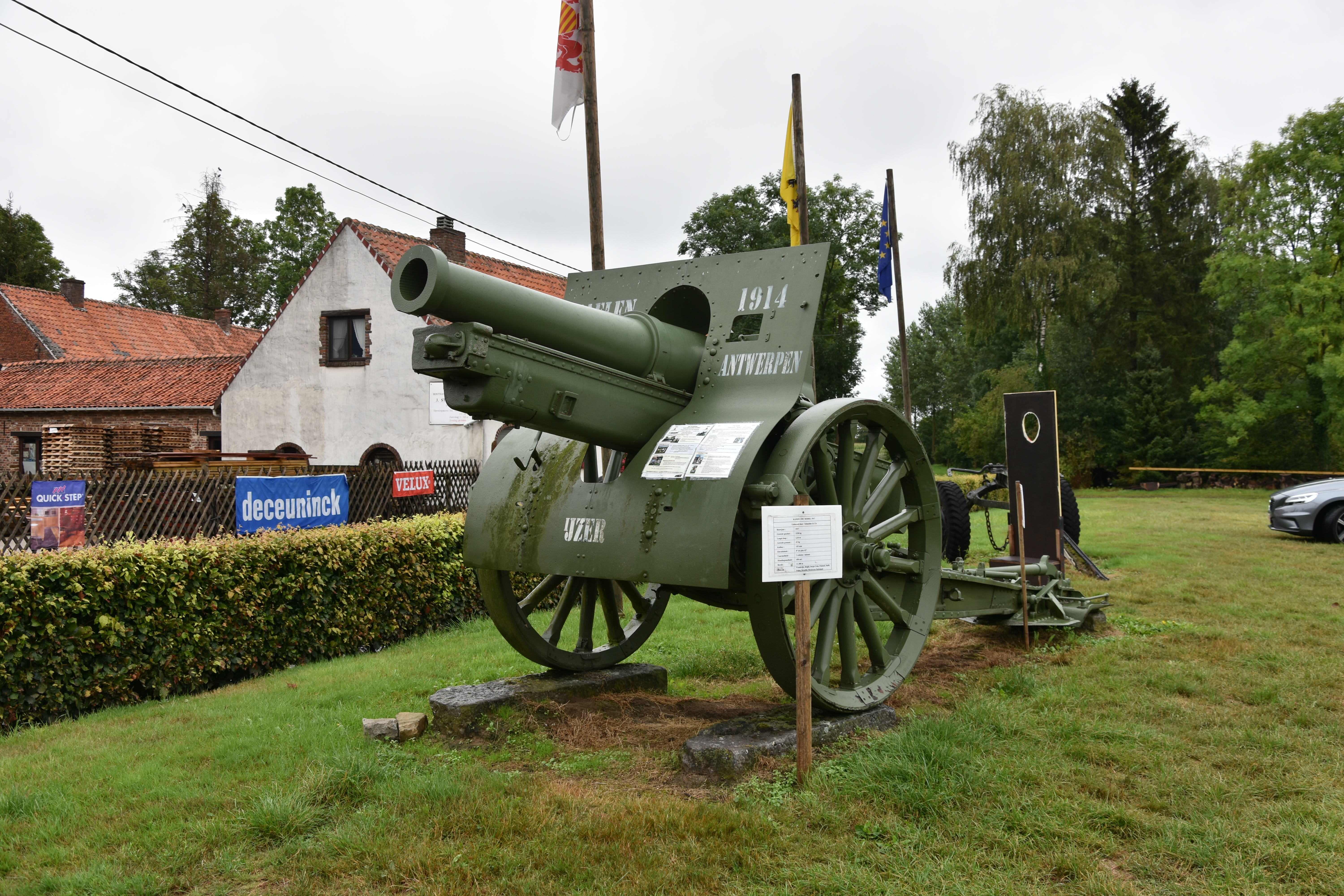 Kanon 155C-1917 Halen 18-08-2019 13-11-18 This photo of immovable heritage has been taken in the Flemish Region